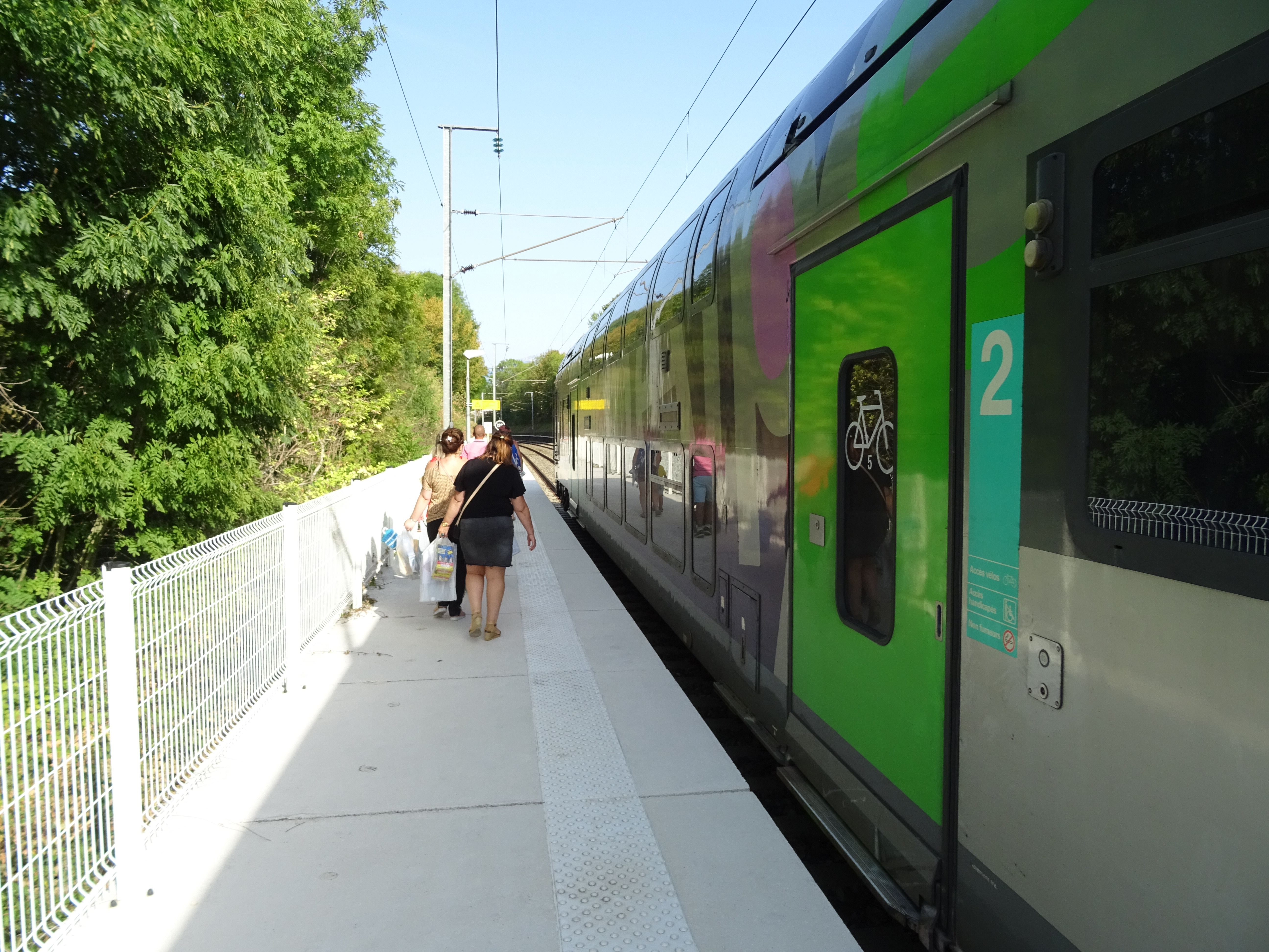 Z24500 à quai en gare de Beaucroissant.